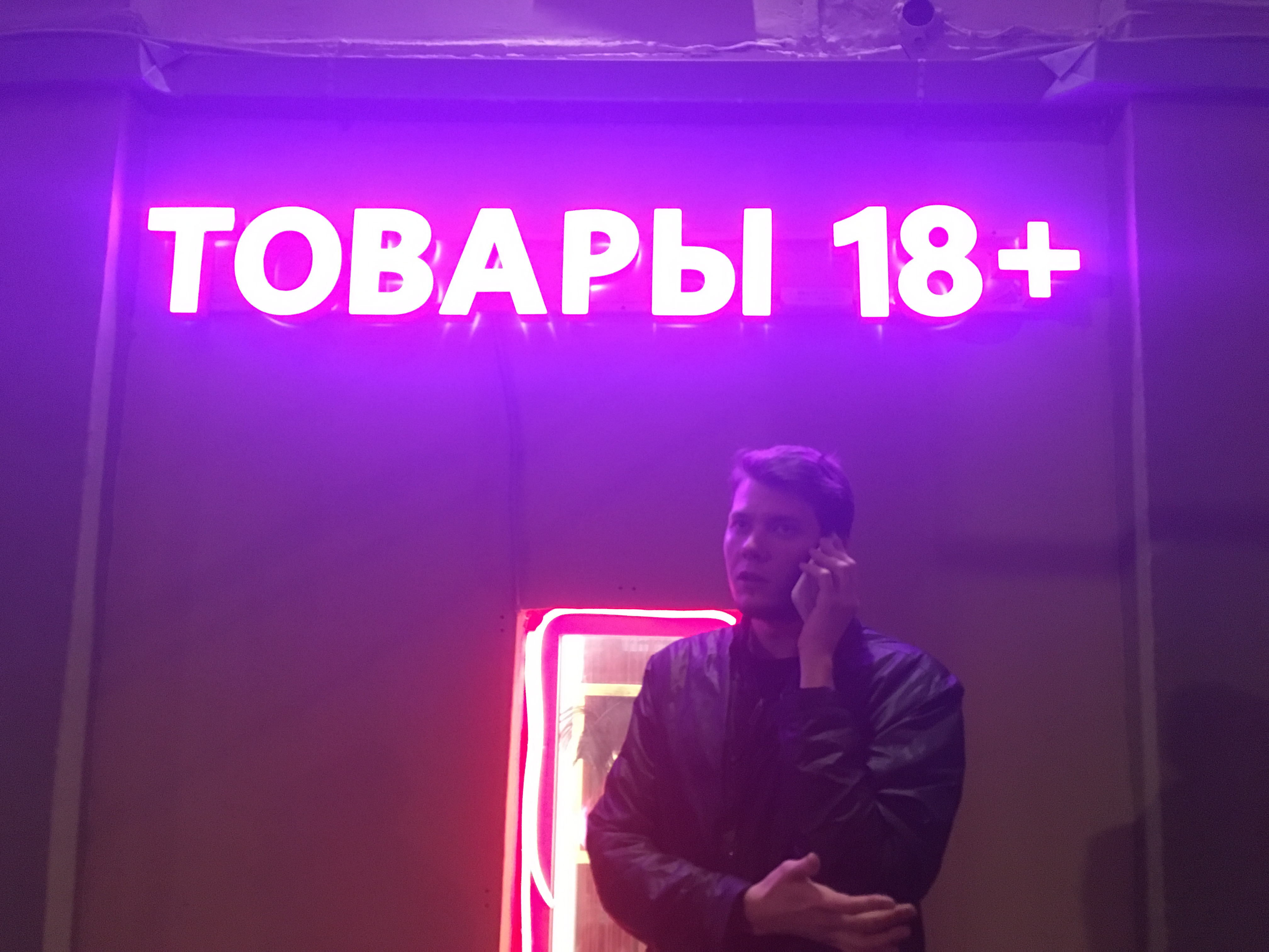 Сергей Давыдов, 2018 Садовая-Черногрязская